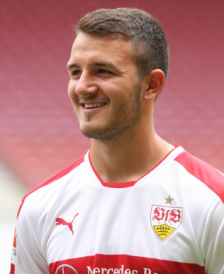 Anto Grgic beim SaisonOpening des VfB 2016. Aufgenommen von